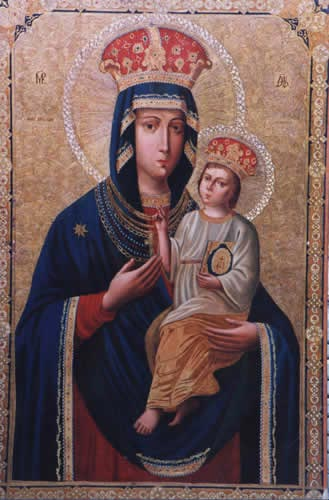 Озерянская икона Божией Матери. Вариант конца 18 - начала 19 века (не оригинал). Список.